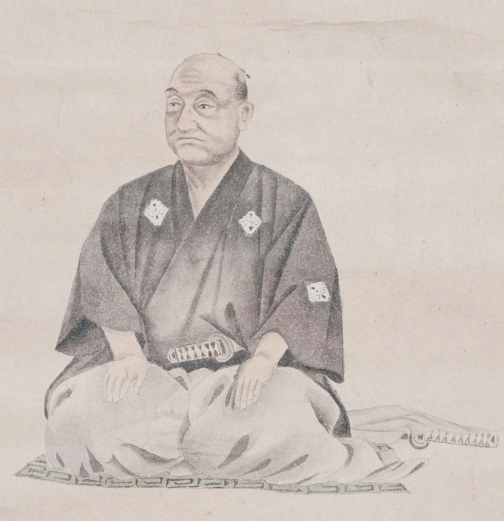 鍋島茂真の肖像。